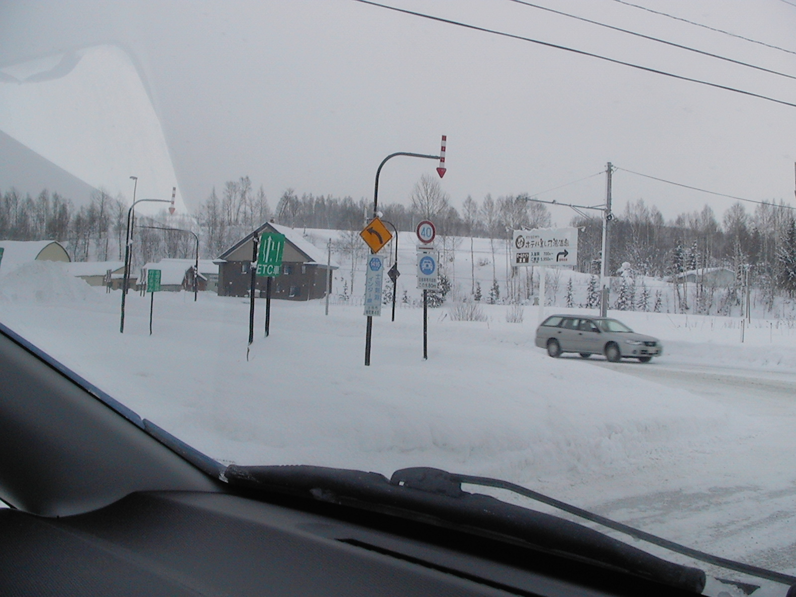 道道1161号士別剣淵インター線を国道40号線から撮影した